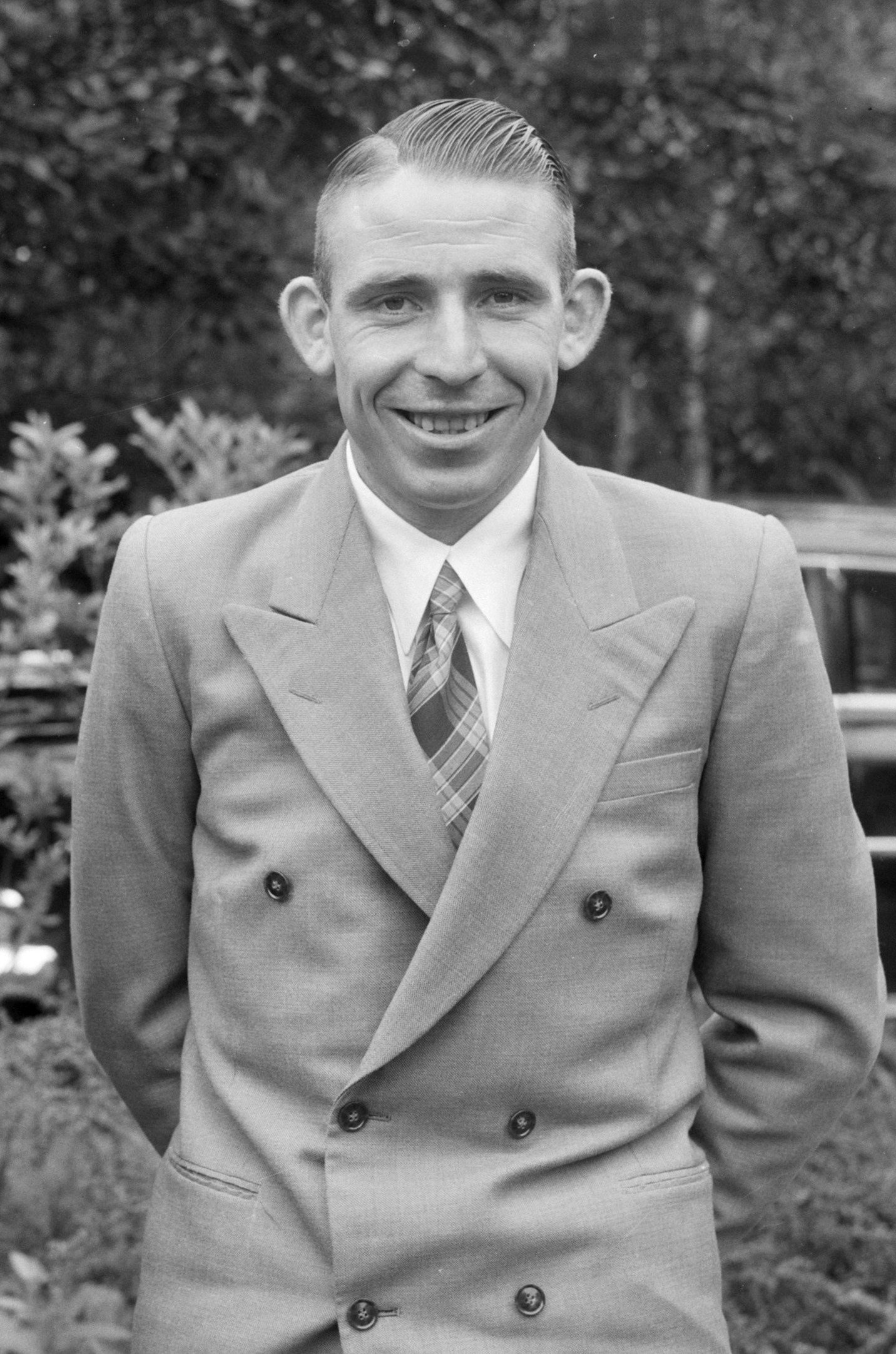 Ondertekening van contracten van Tour de France ploeg t huize van Cees Pellenaars te Breda, Jules Maenen